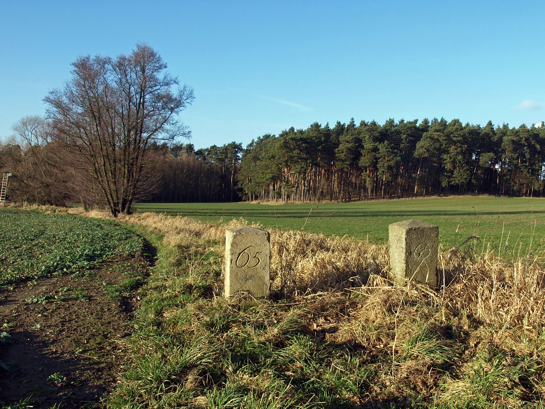 Grenzstein Nr. 65 - Historische Landesgrenze Königreich Sachsen Königreich Preußen 1815 (Wiener Kongress)